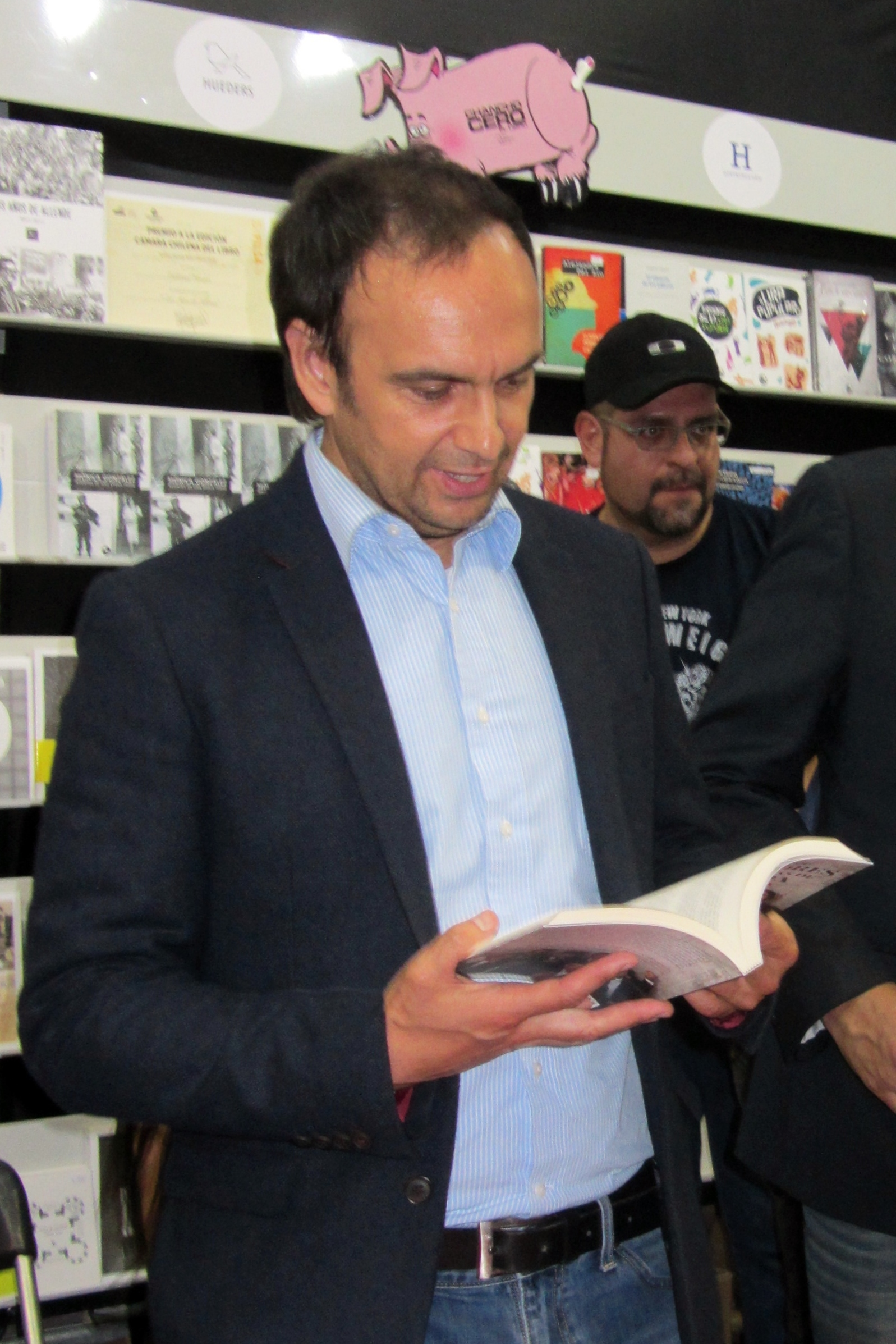 El periodista chileno Rodrigo Sepúlveda (atrás está el escritor Patricio Jara) en la Feria Internacional del Libro de Santiago 2015